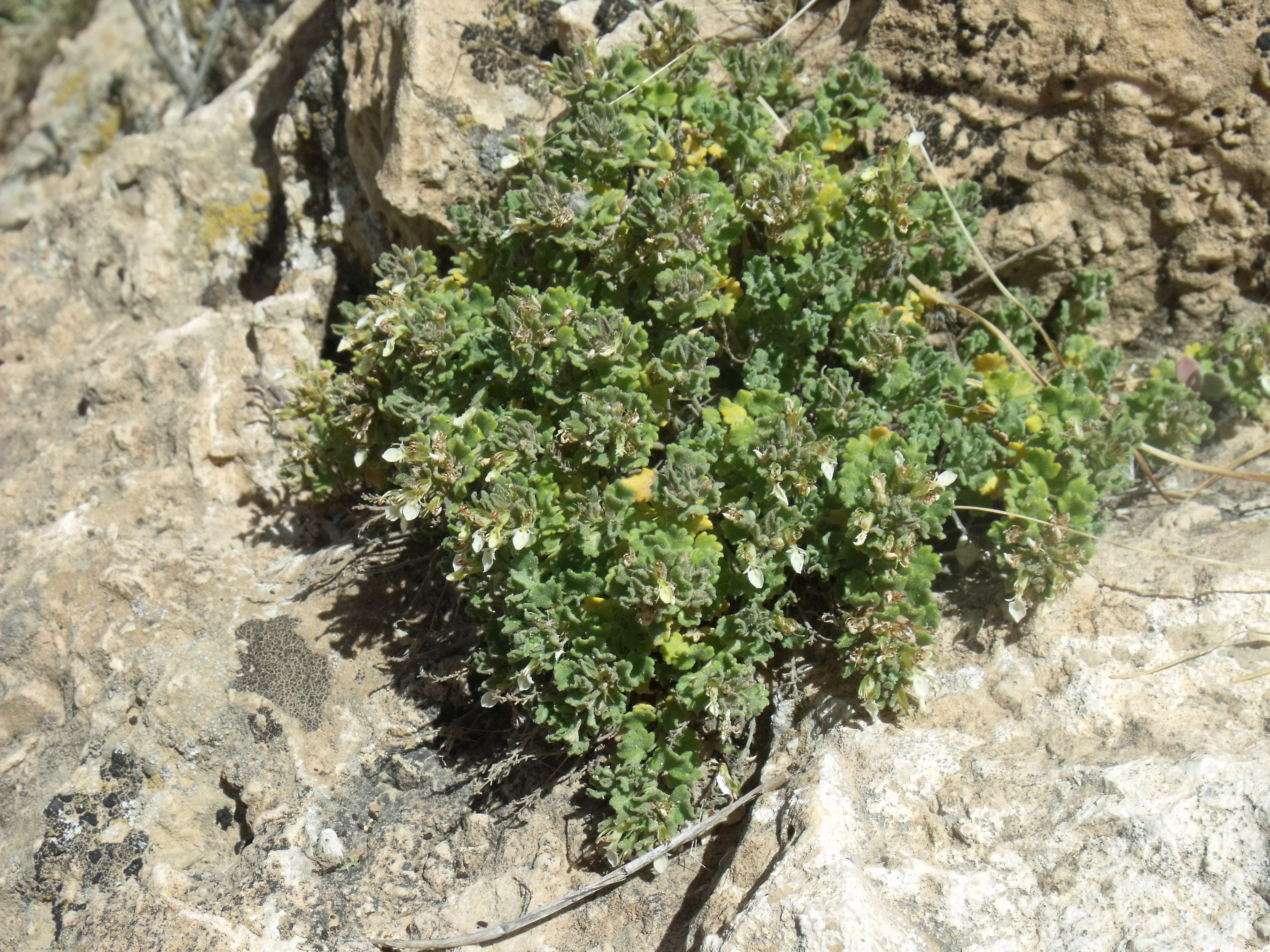 Photographie prise au jbel Orbata (Lalla, Gafsa). Plante appelée localement hachichat bel kacem ben salem.